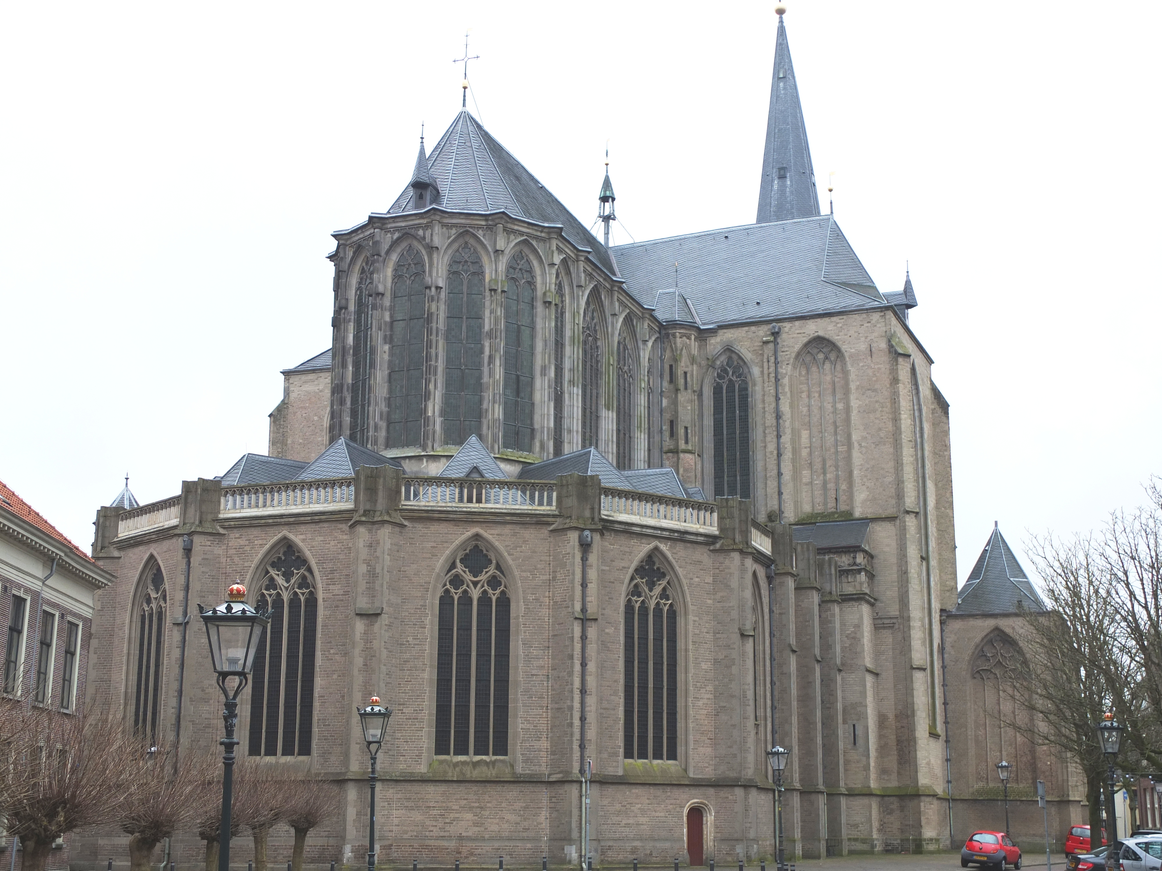 Exterieur Bovenkerk (Kampen)